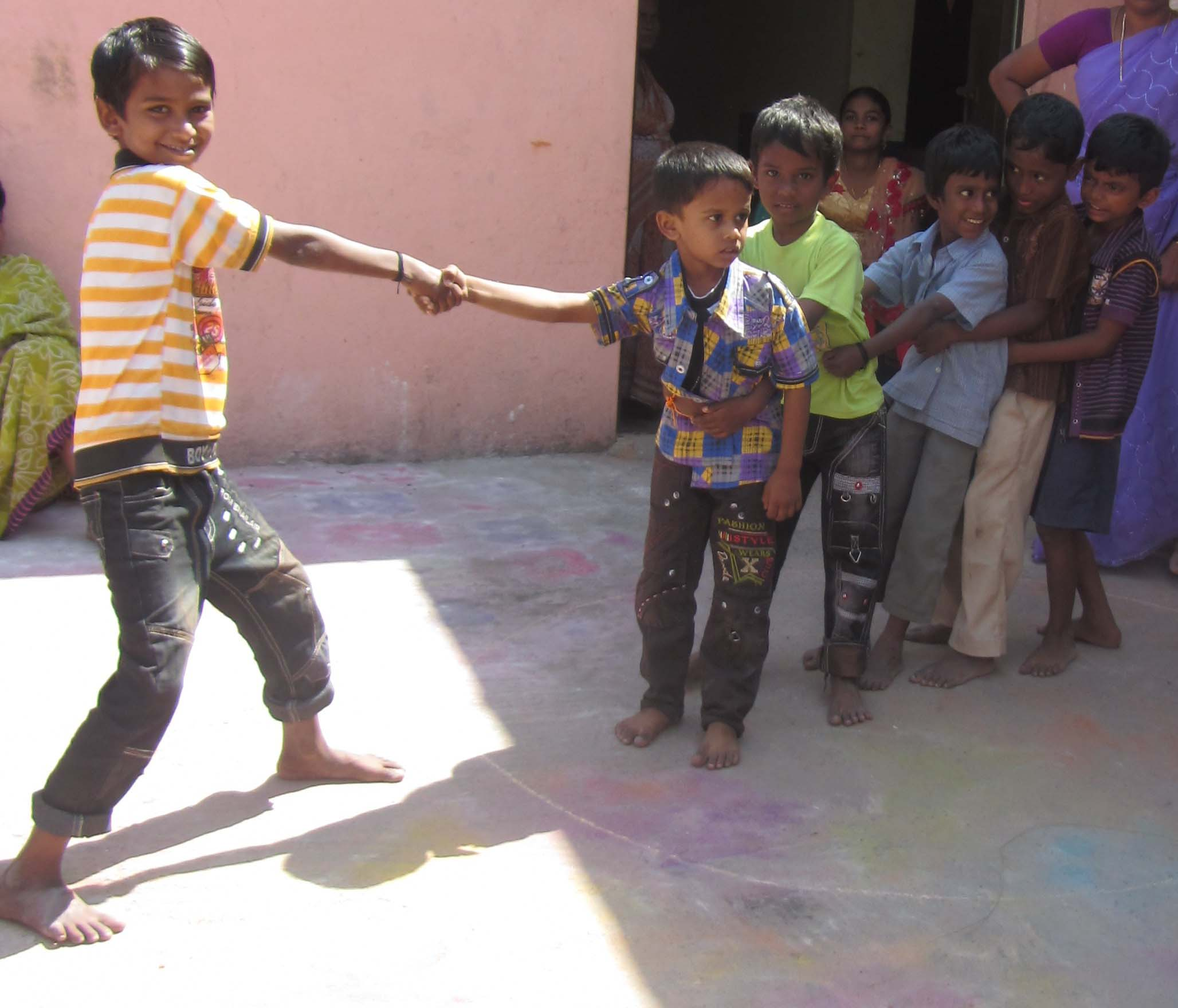 own shot - கோட்டான் கோட்டான் விளையாட்டில் வட்டத்துக்குள் இருப்பவரை வட்டத்துக்கு வெளியே இழுத்தல்.